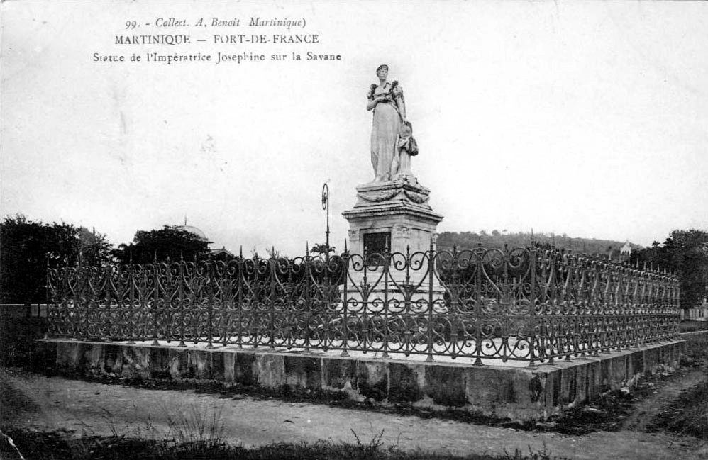 Statue de l'impératrice Joséphine sur la Savane à Fort-de-France